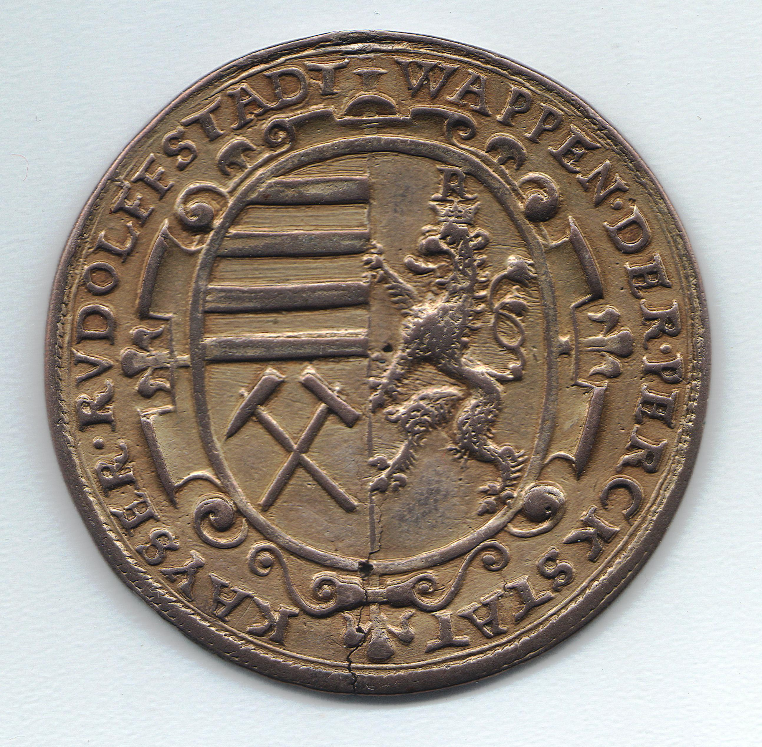 Rudolfov výtěžková medaile 1593 avers